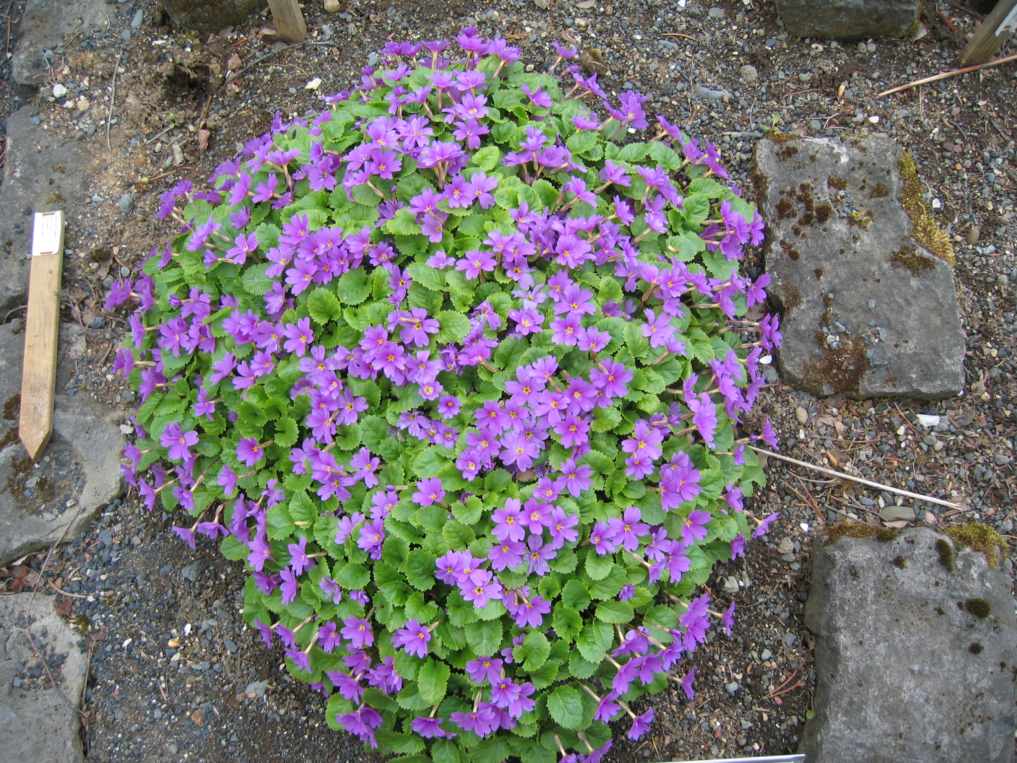 photo taken by Salvör in Grasagarður Reykjavíkur Botanical garden in Reykjavik, Iceland.